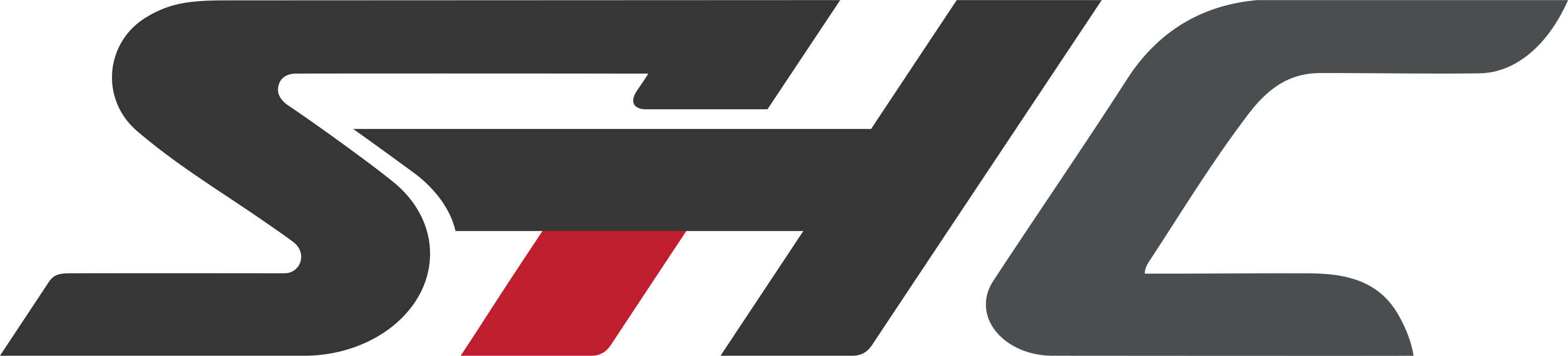 Novo Logo do Grupo SHC apresentado ao mercado em 2018